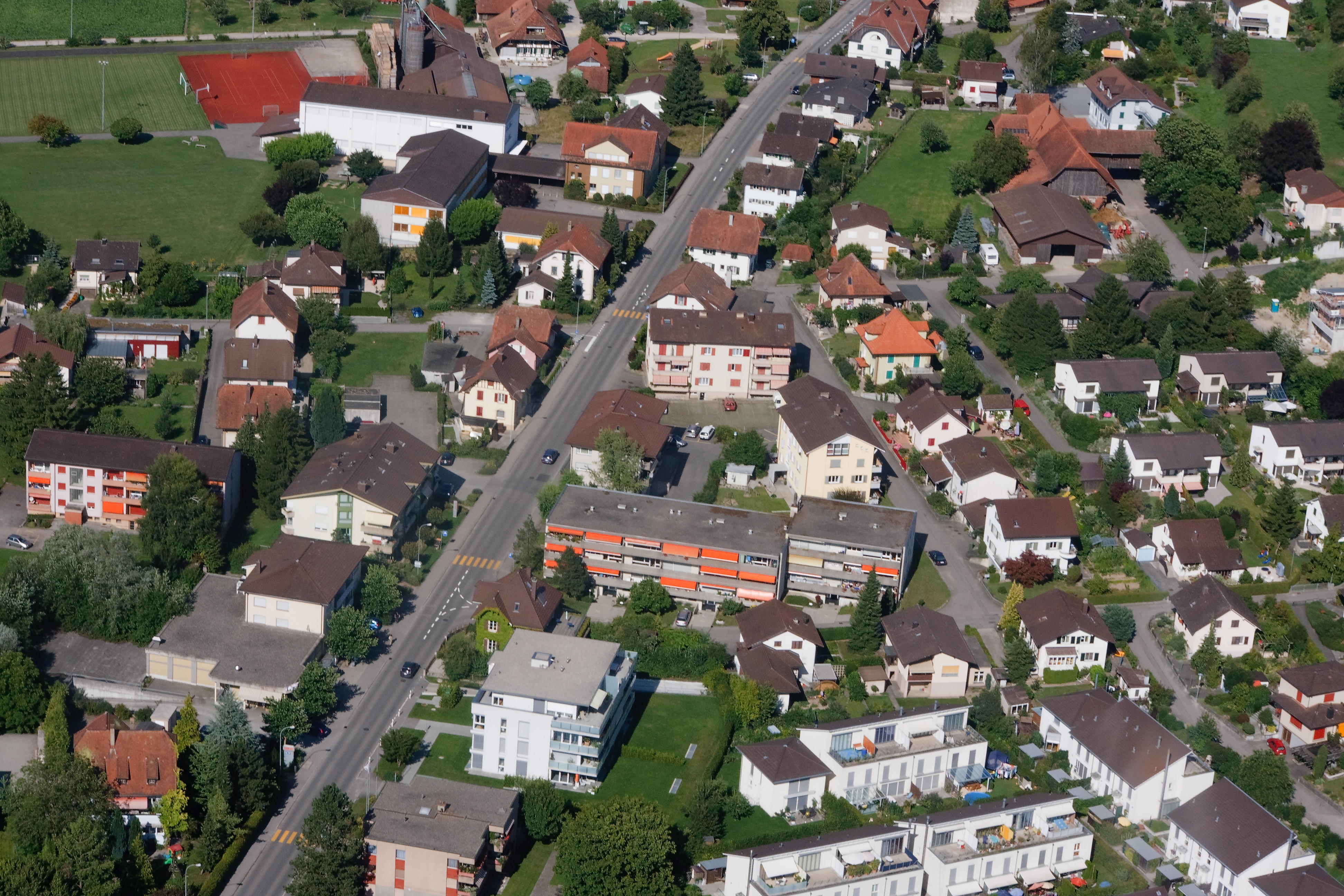 Luftaufnahme des Dorfkerns von BusswilBildrand unten links: Gemeindeverwaltungeinstöckiger Anbau links unten: Coop-Einkaufszentrumoben links: Schulhaus